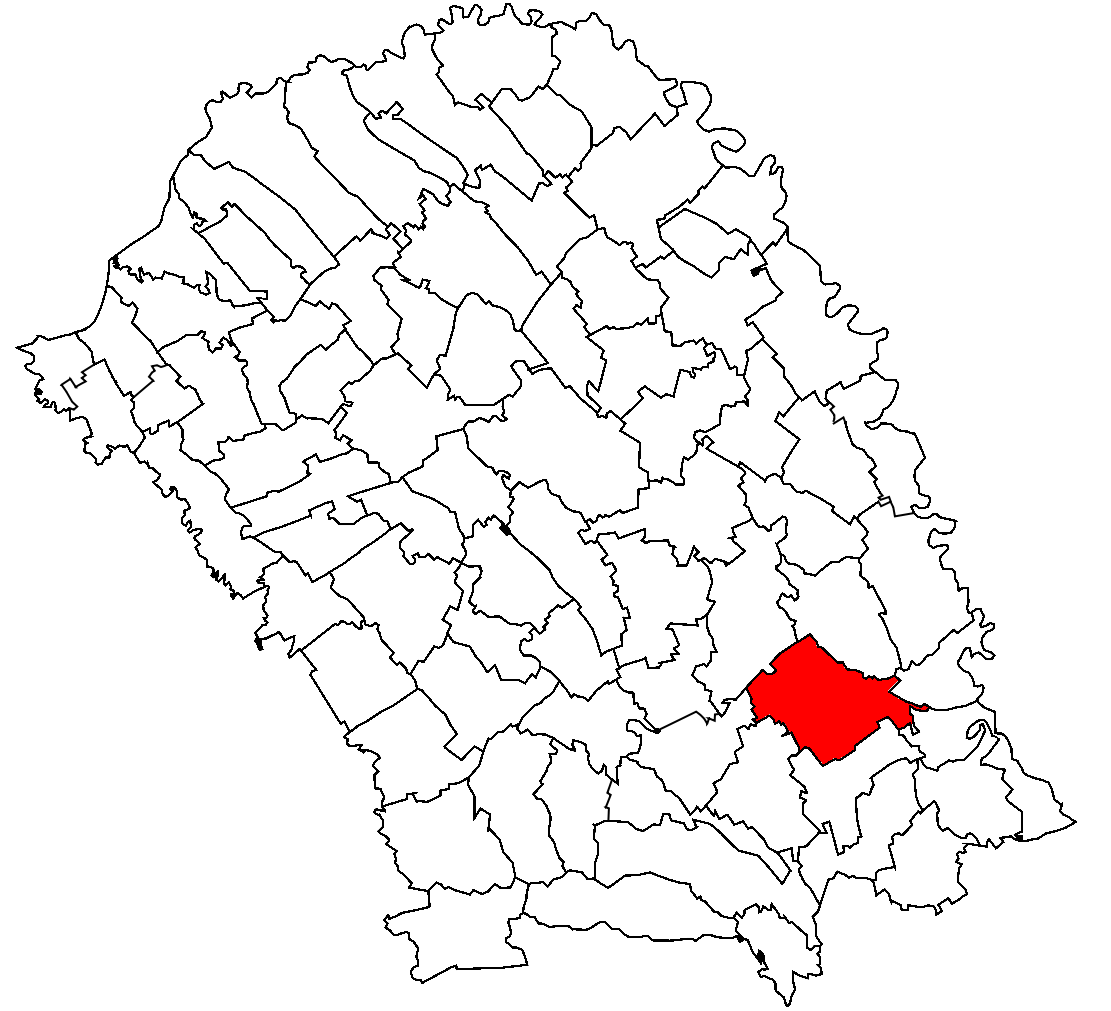 Categorie:Hărţi ale judeţului Botoşani